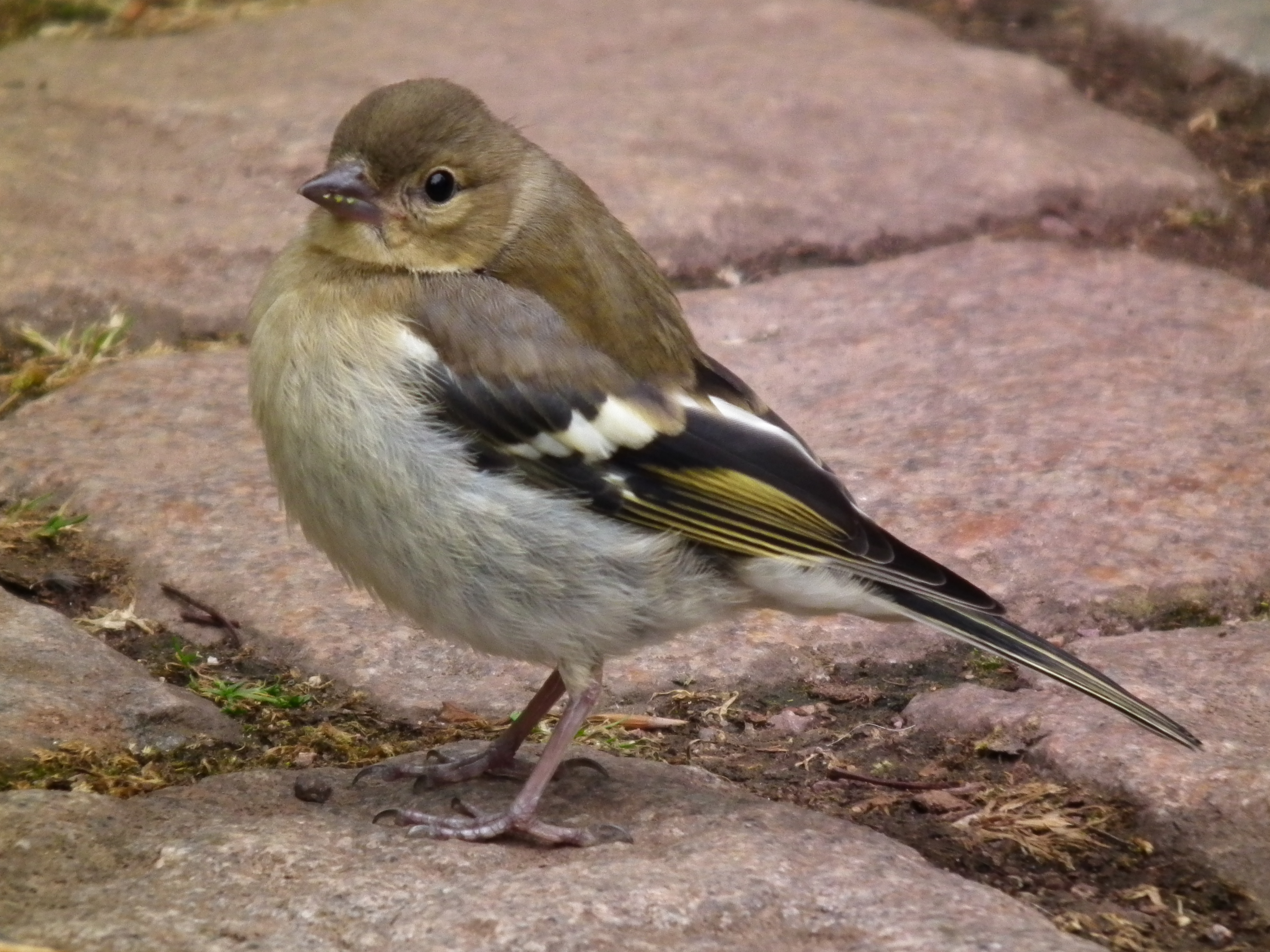 Buchfink (Fringilla coelebs), fotografiert in Fulda (Hessen, Deutschland)